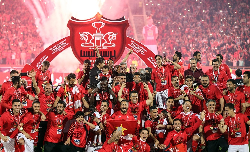 جشن قهرمانی پرسپولیس در لیگ هفدهم